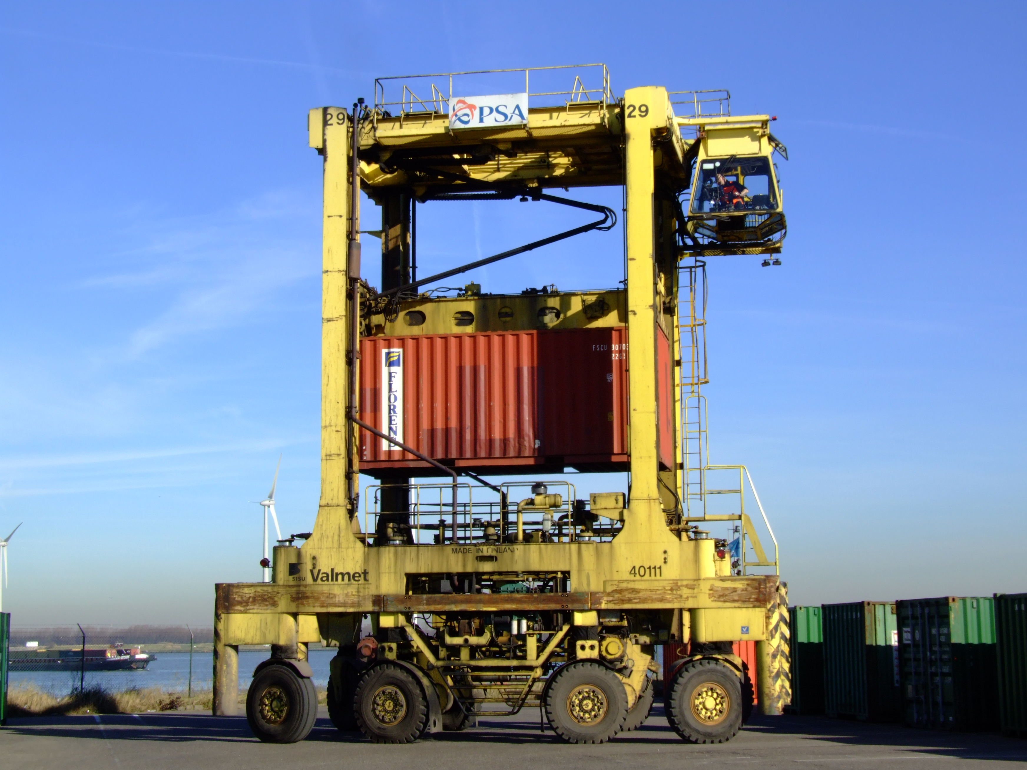 SISU Valmet 44011 Straddle carrier container mover.